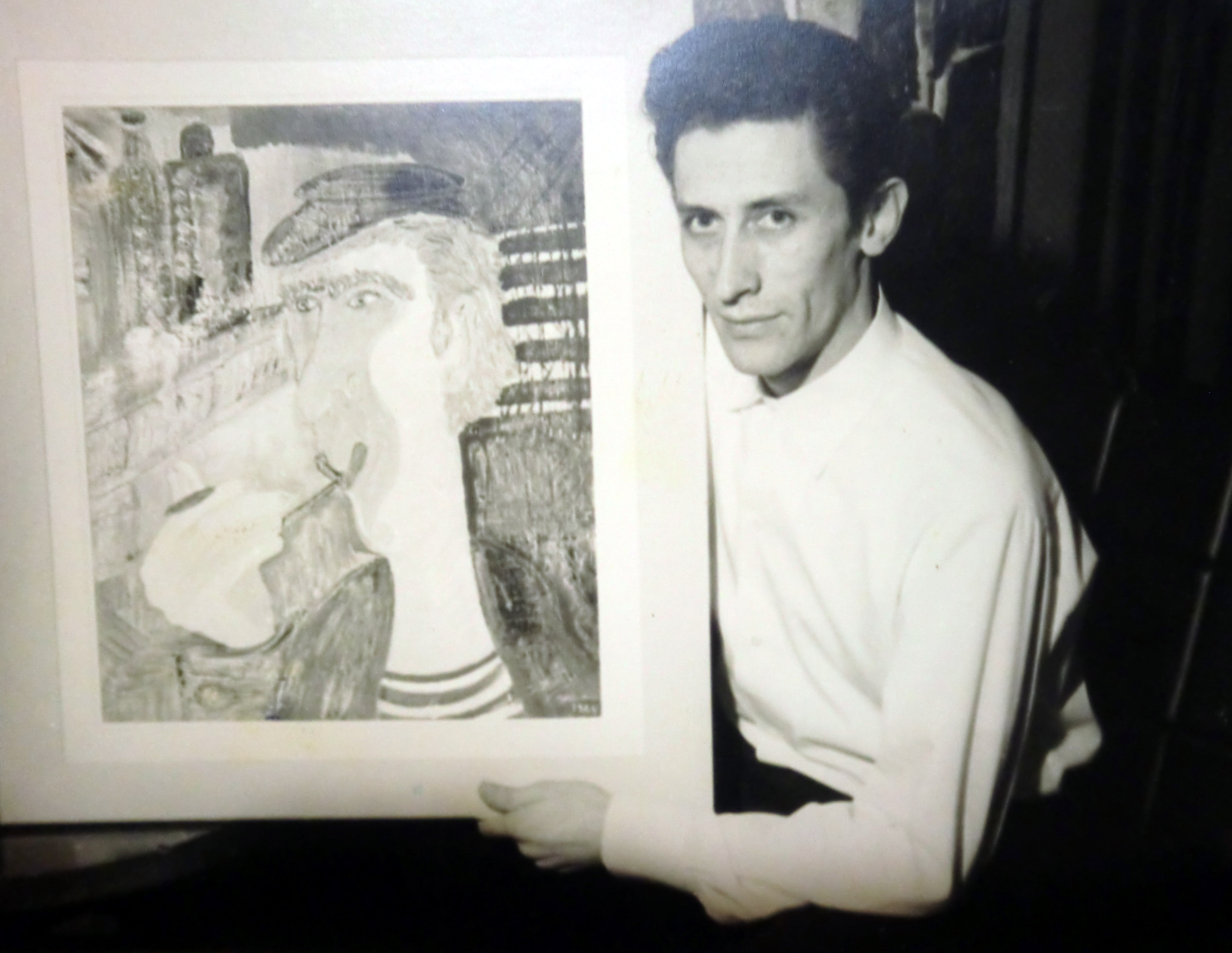 Juan en una exposicion